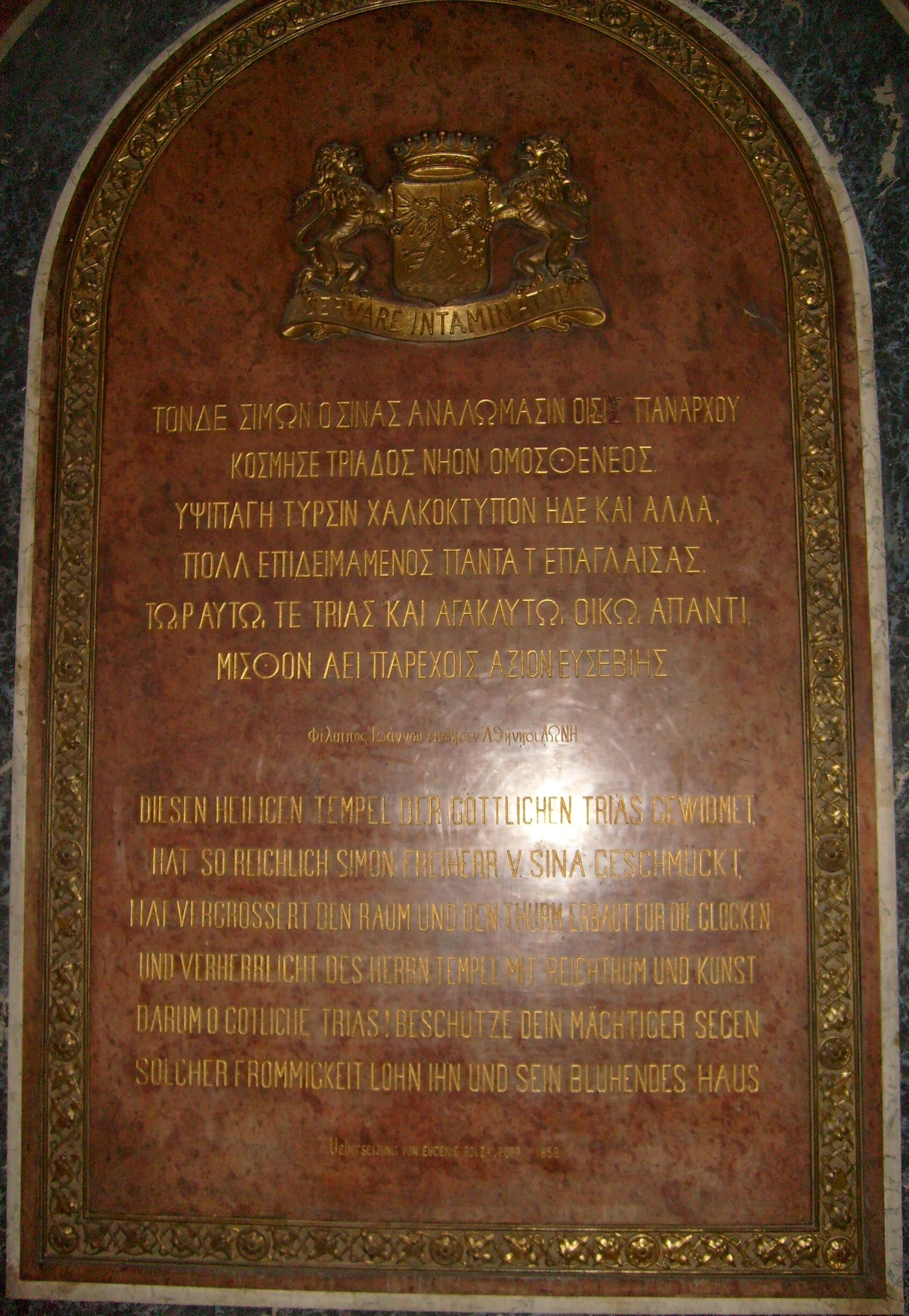 Griechisch-orthodoxe Kirche zur Hl. Dreifaltigkeit, Wien: Gedenktafel für Baron Sina.